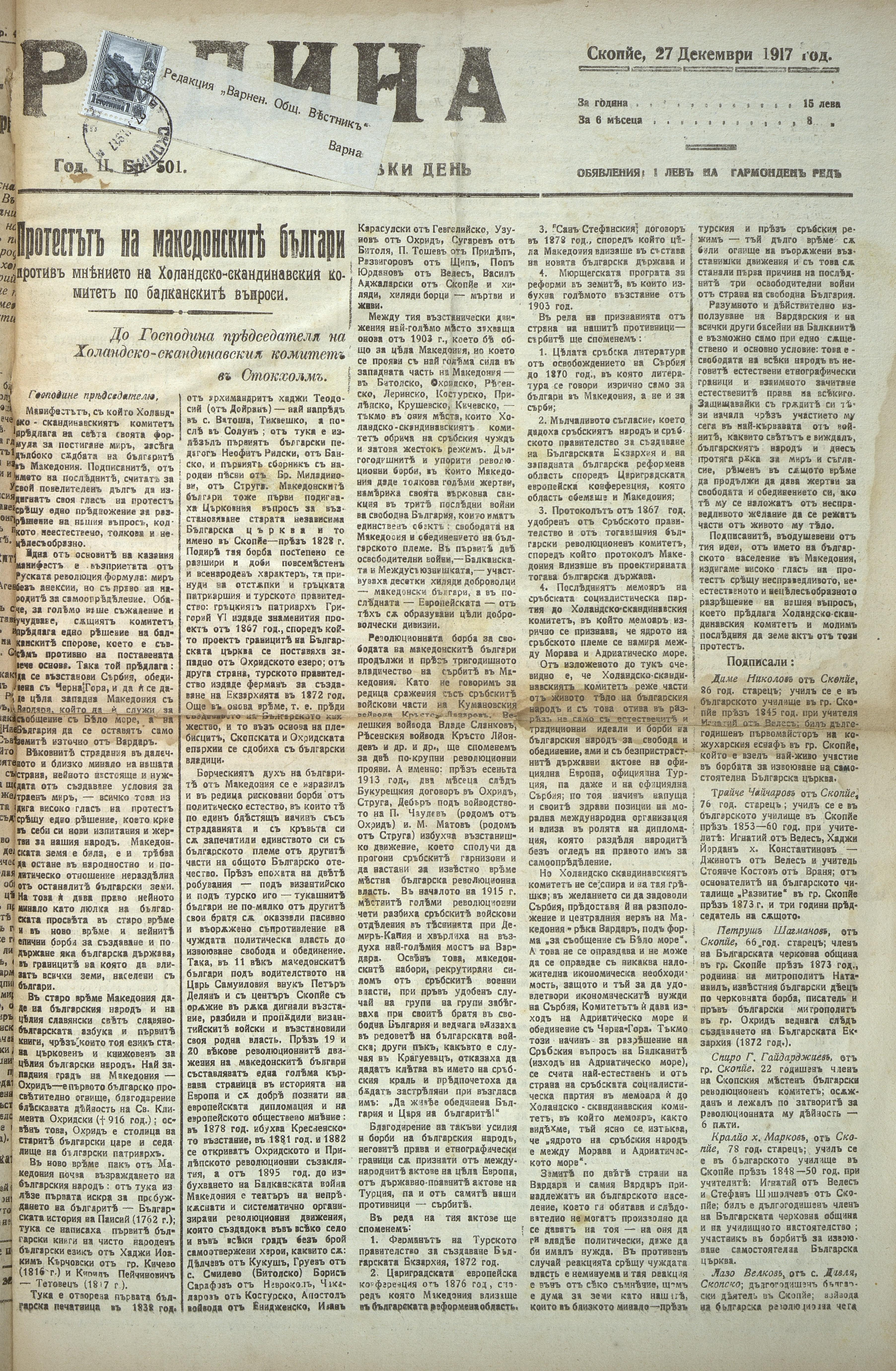 Вестник „Родина“, Скопие.